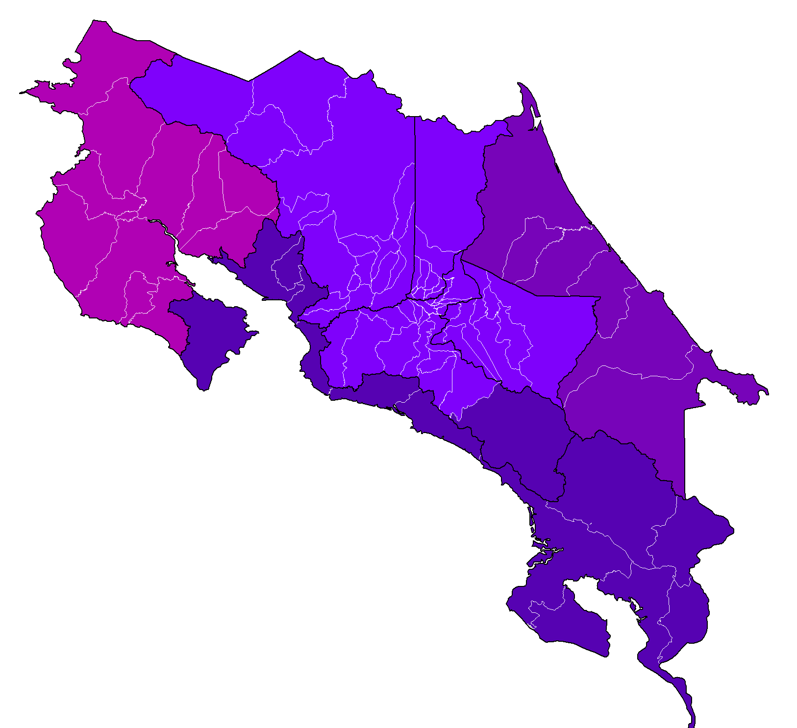 Zonas dialectales del español costarricense